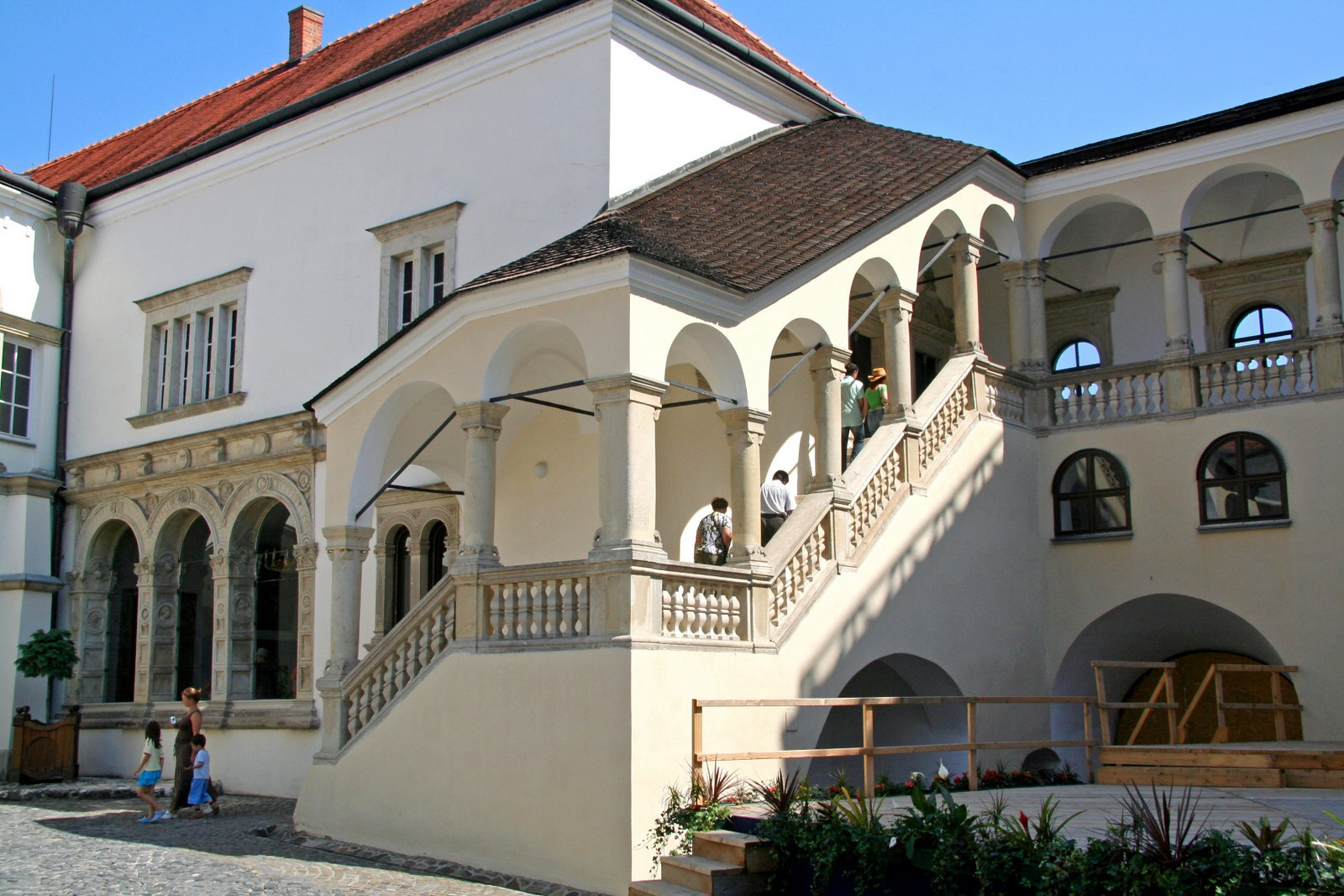 Lorántffy-loggia (Sárospatak, Rákóczi-vár) This is a photo of a monument in Hungary, Identifier: 18069